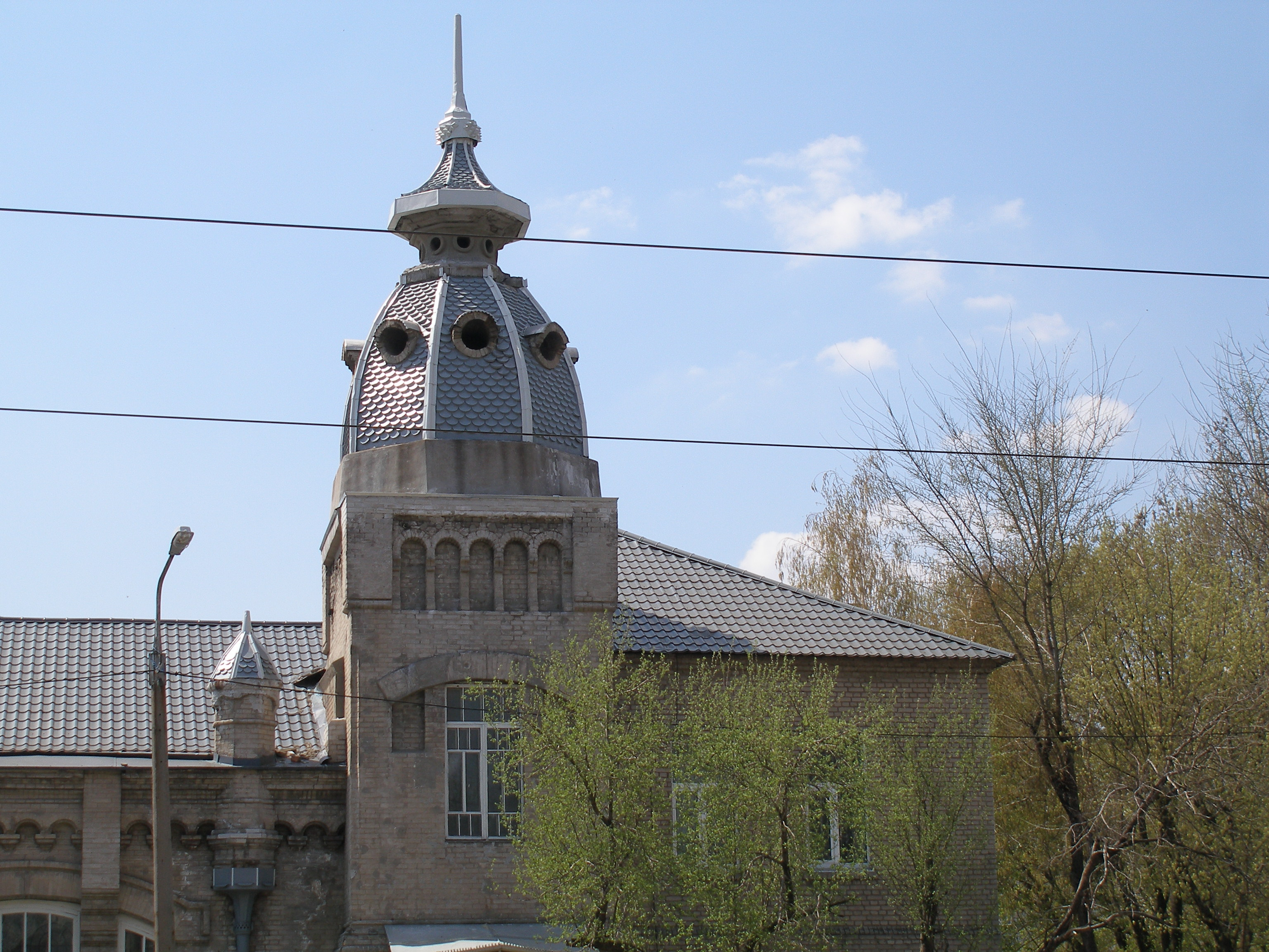 Будинок першої теплоелектростанції, Запоріжжя, вул. Горького, 73